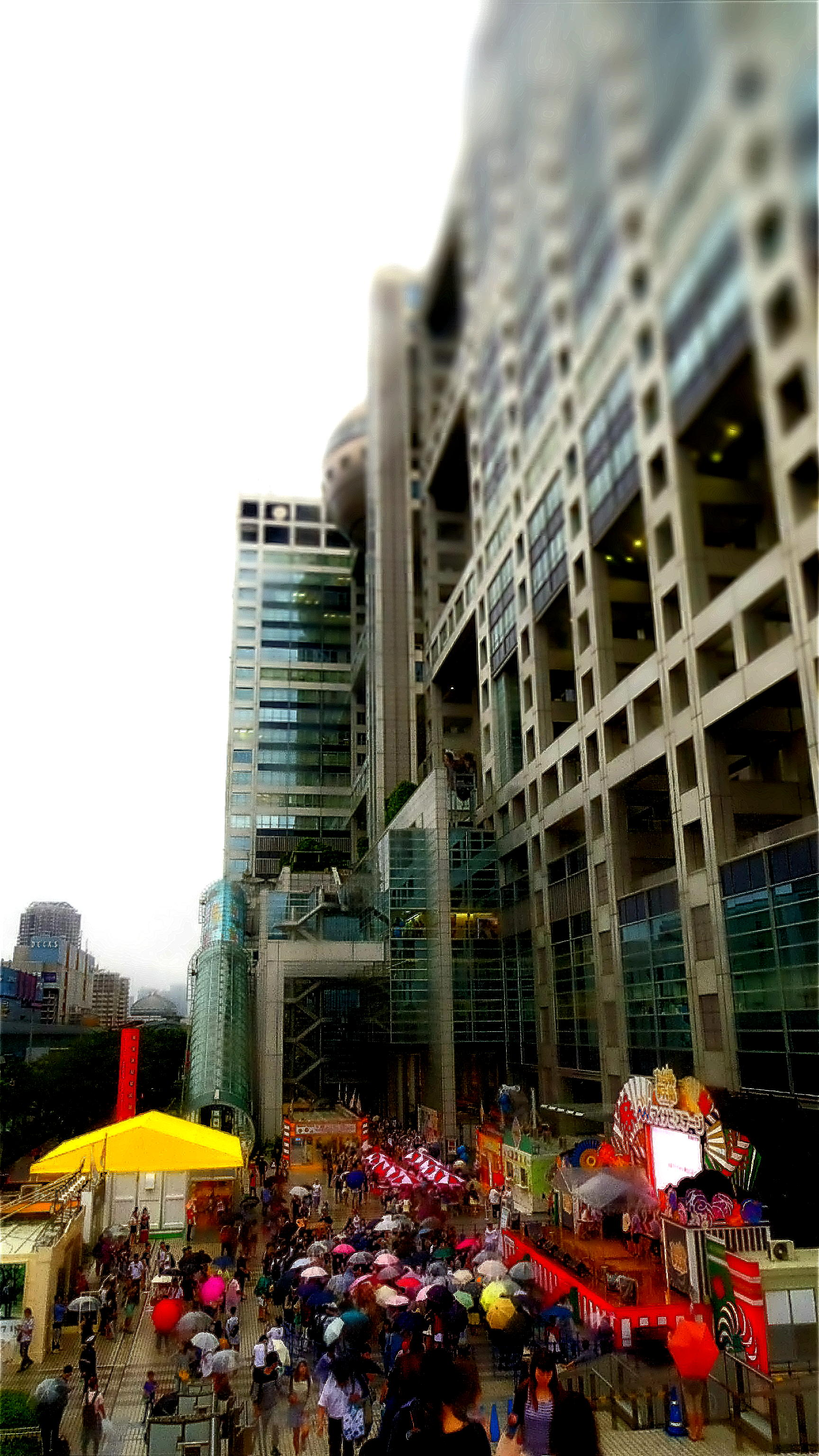 フジテレビの夏イベント「お台場夢大陸」(2015年)会場。